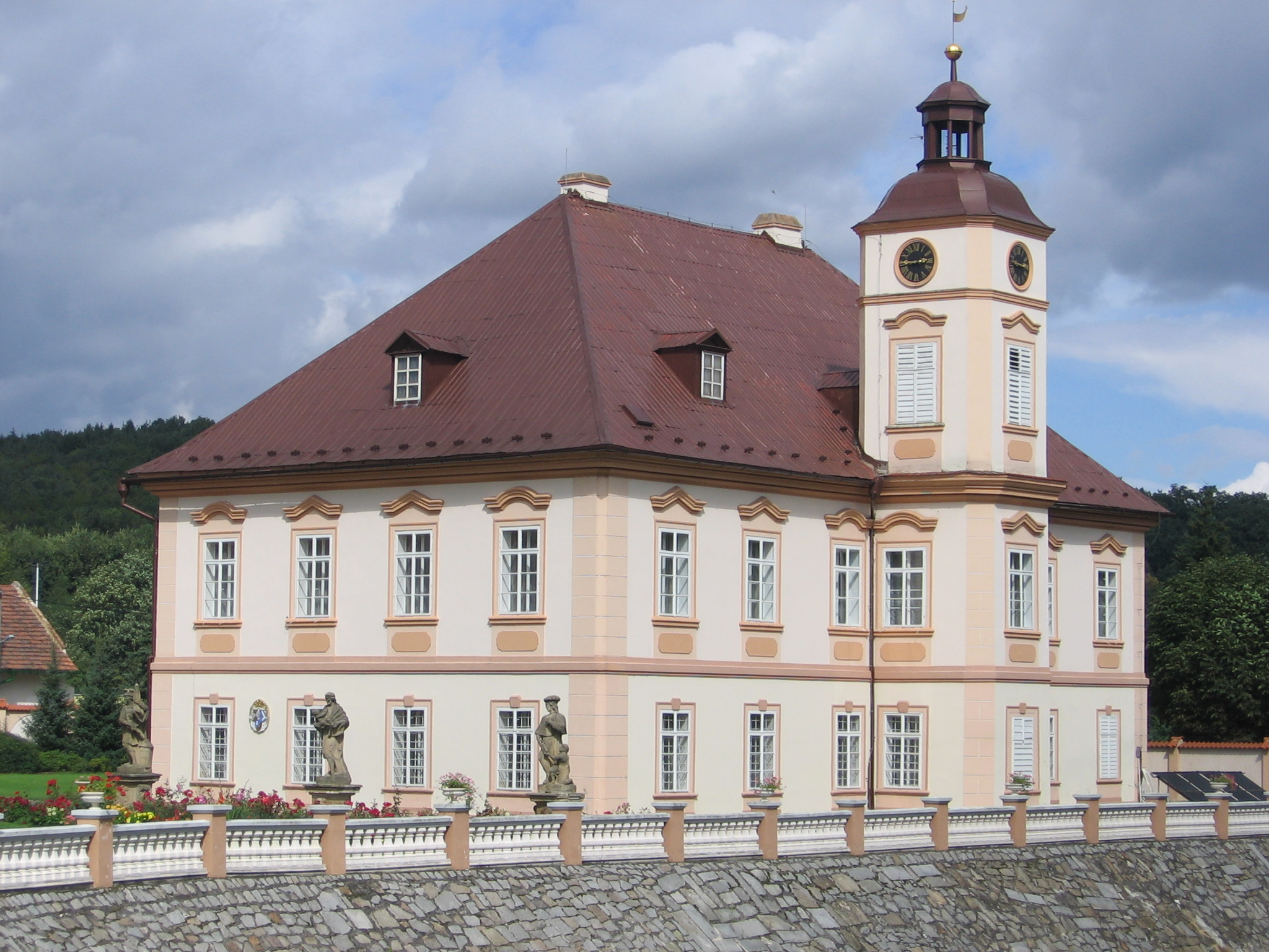 Zámek ve Štěnovicích (PJ).